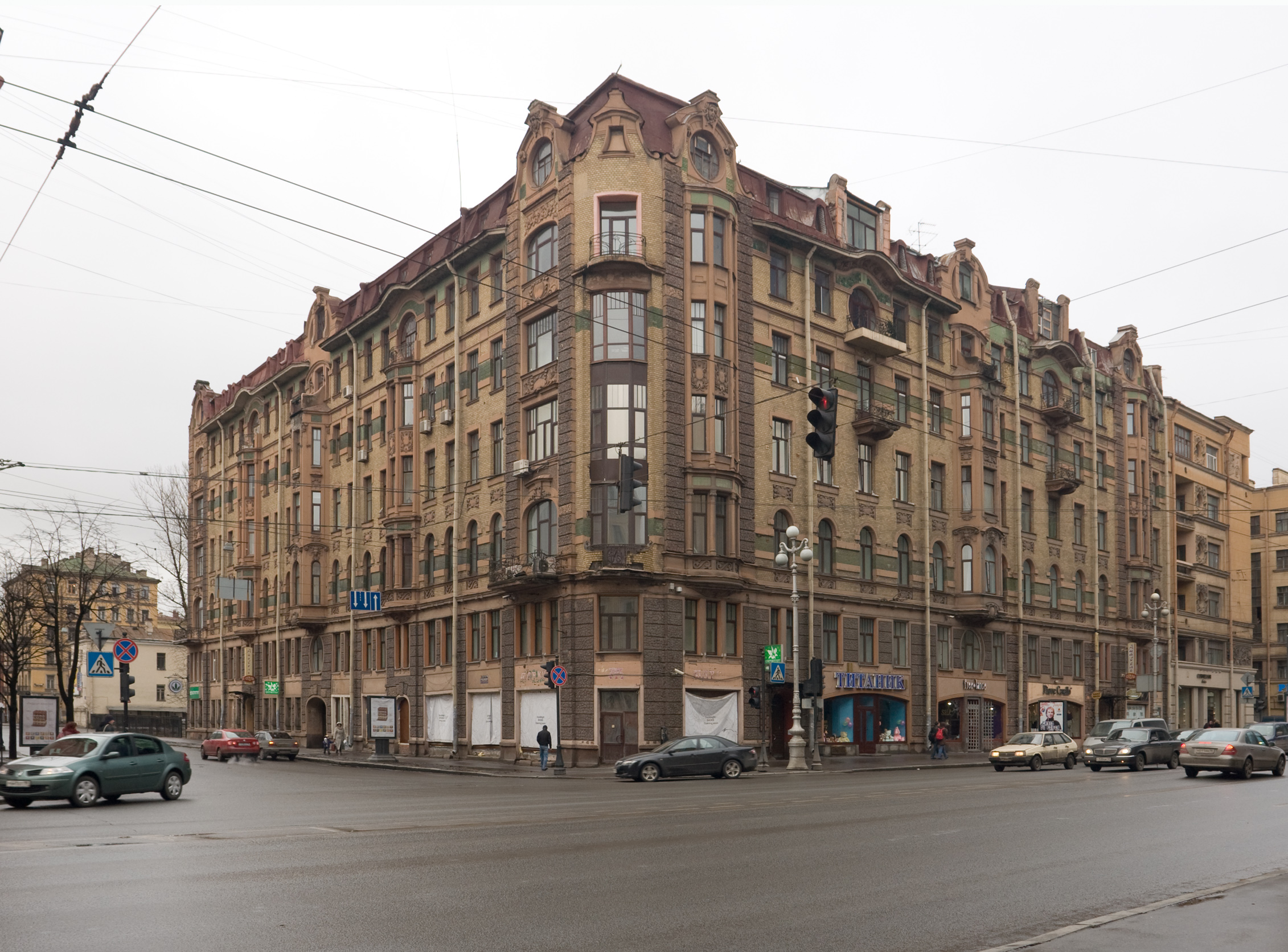 Невский 147, угол с ул. Профессора Ивашенцева